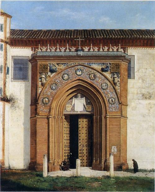 La obra representa la portada del convento de Santa Paula de la ciudad de Sevilla, (España).